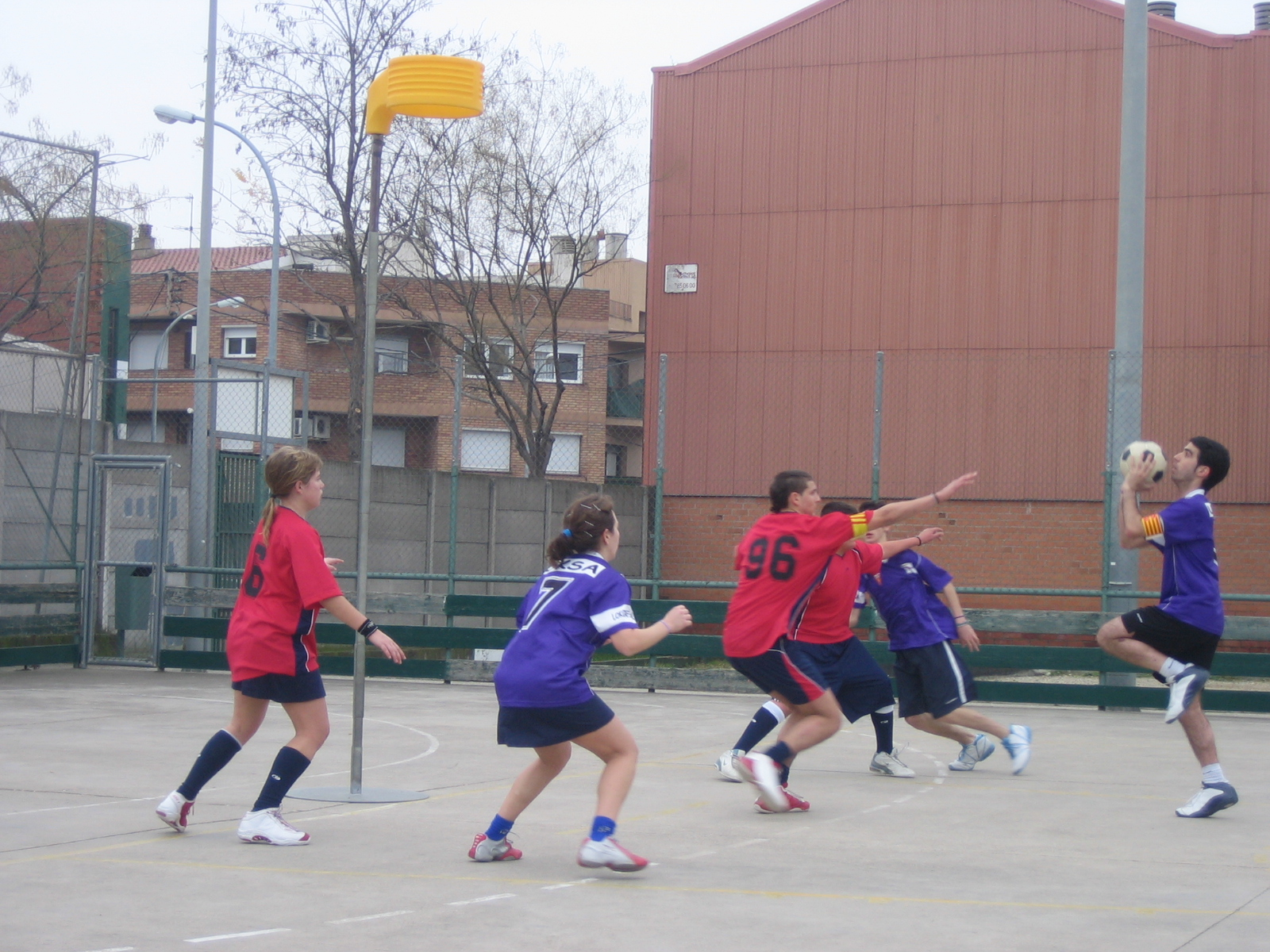 Un partit de la UKSA de la Temporada 2005-2006